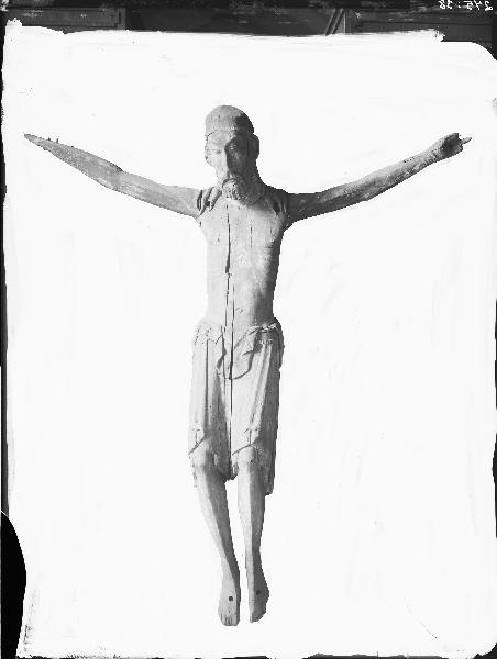 Krucifix, trä, fragment. Korset saknas. Kategori: (05) Krucifix Krucifix, trä, fragment. Korset saknas.